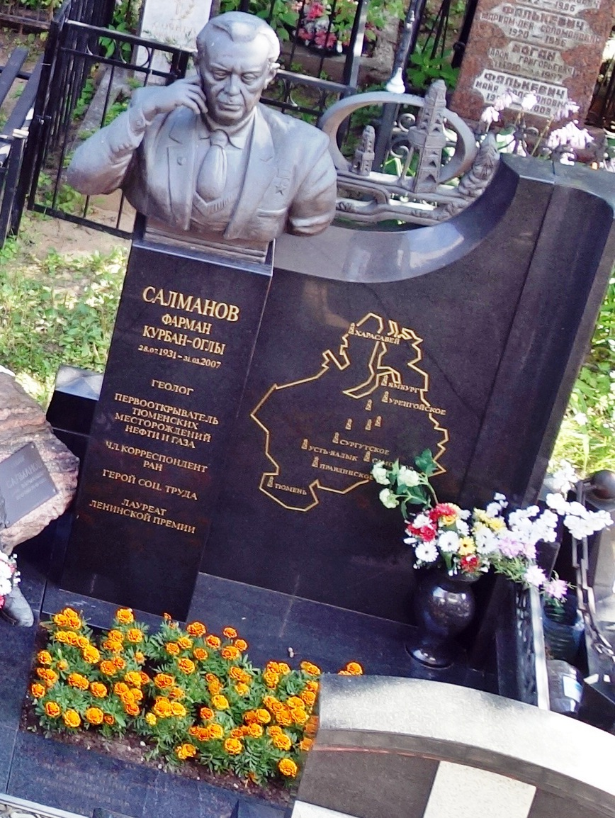 Ваганьковское кладбище: улица Сергея Макеева, 15, Пресненский, Центральный округ, Москва